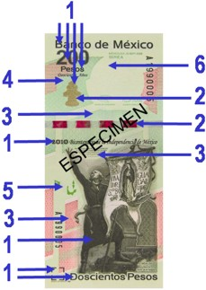 Características de seguridad del billete conmemorativo de 200 pesos